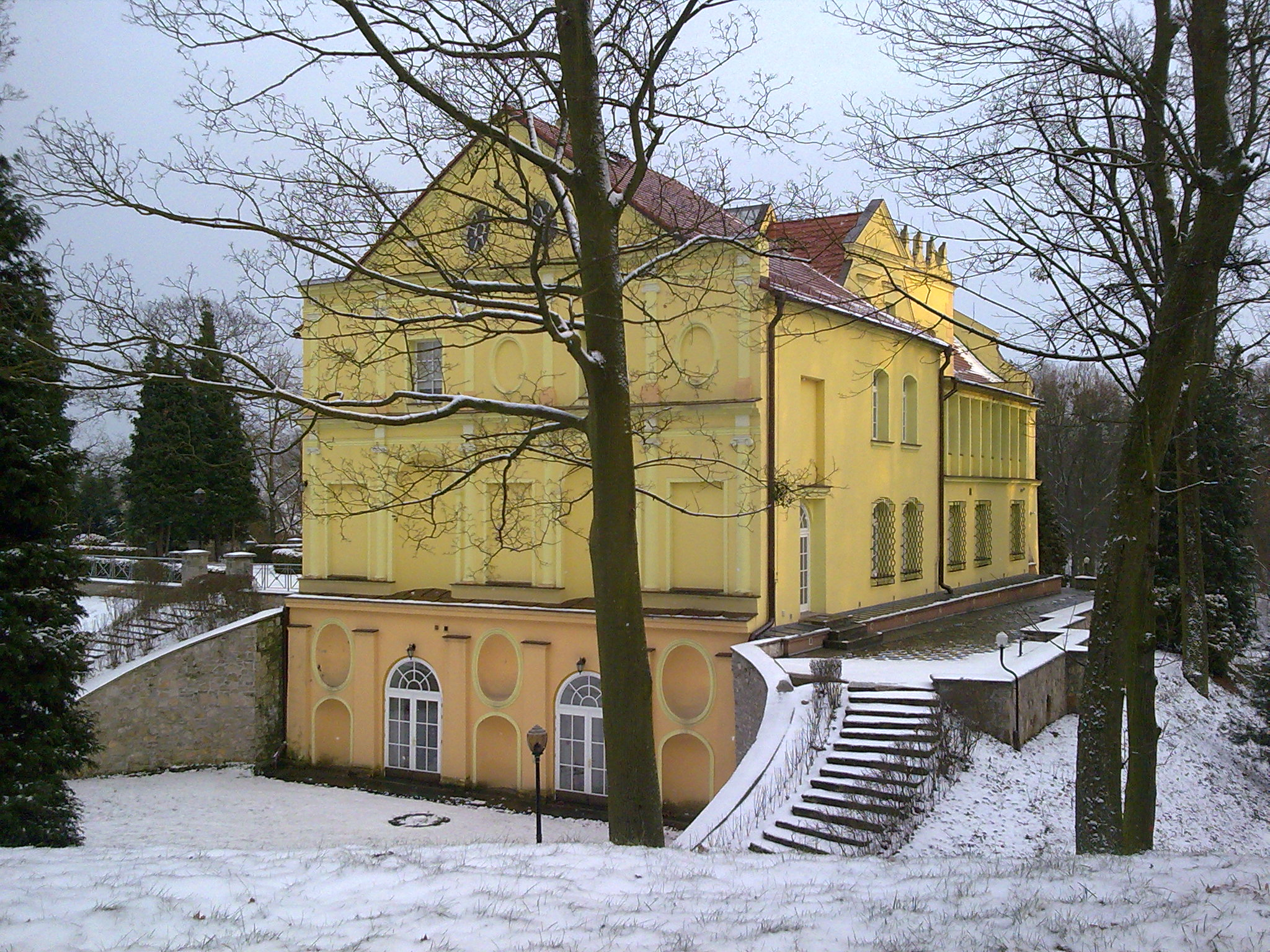 Zamek w Rogowie Opolskim.